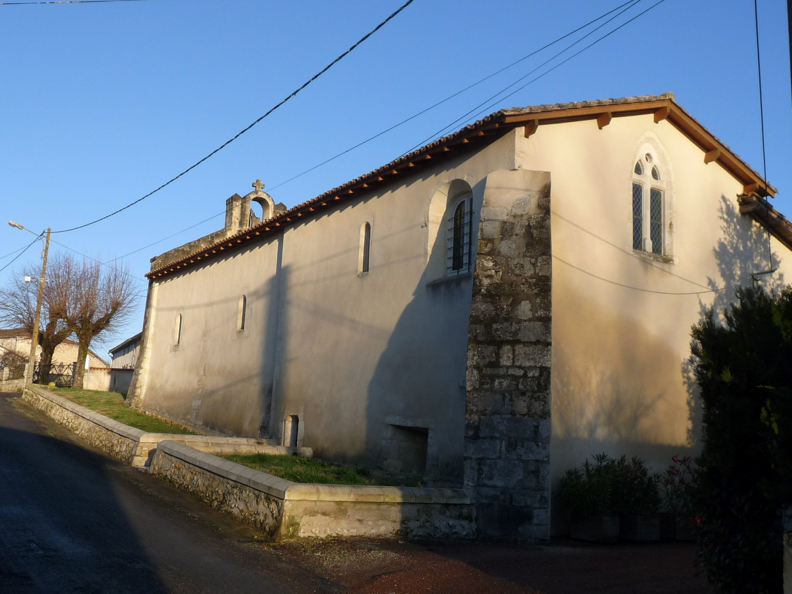 Eglise de Vallet, Charente-Maritime, France